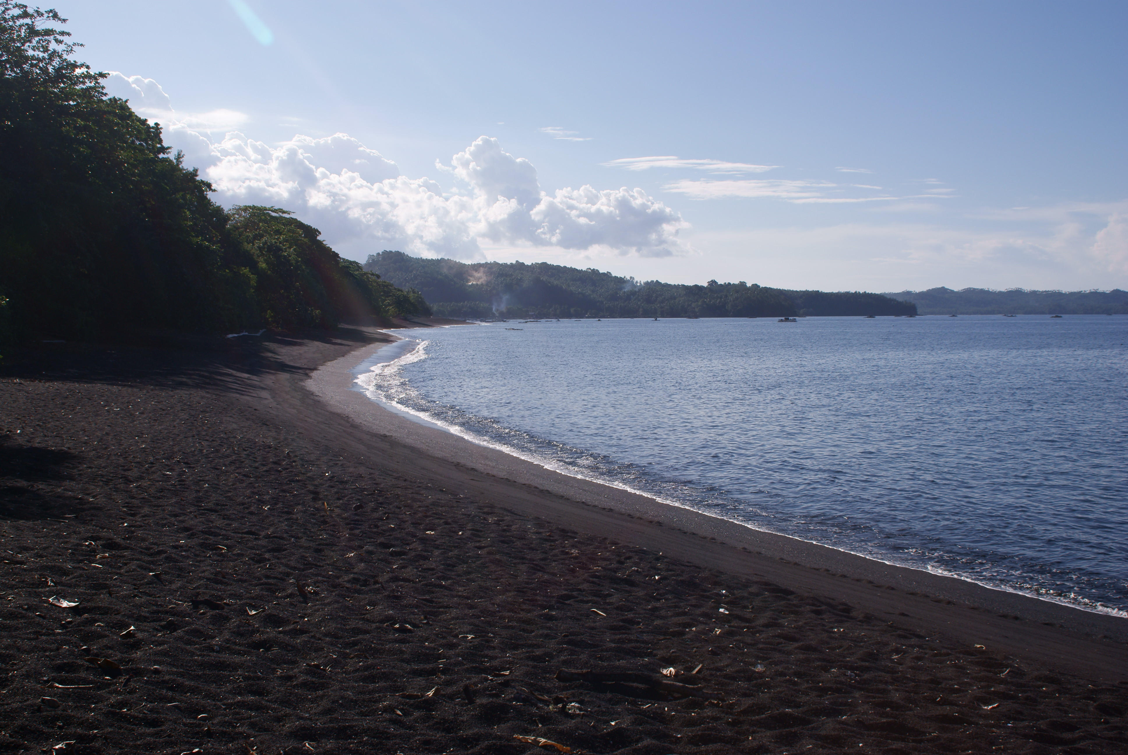 Batuputih Beach, Tangkoko Batuputih Nature Reserve, North Sulawesi, Indonesia